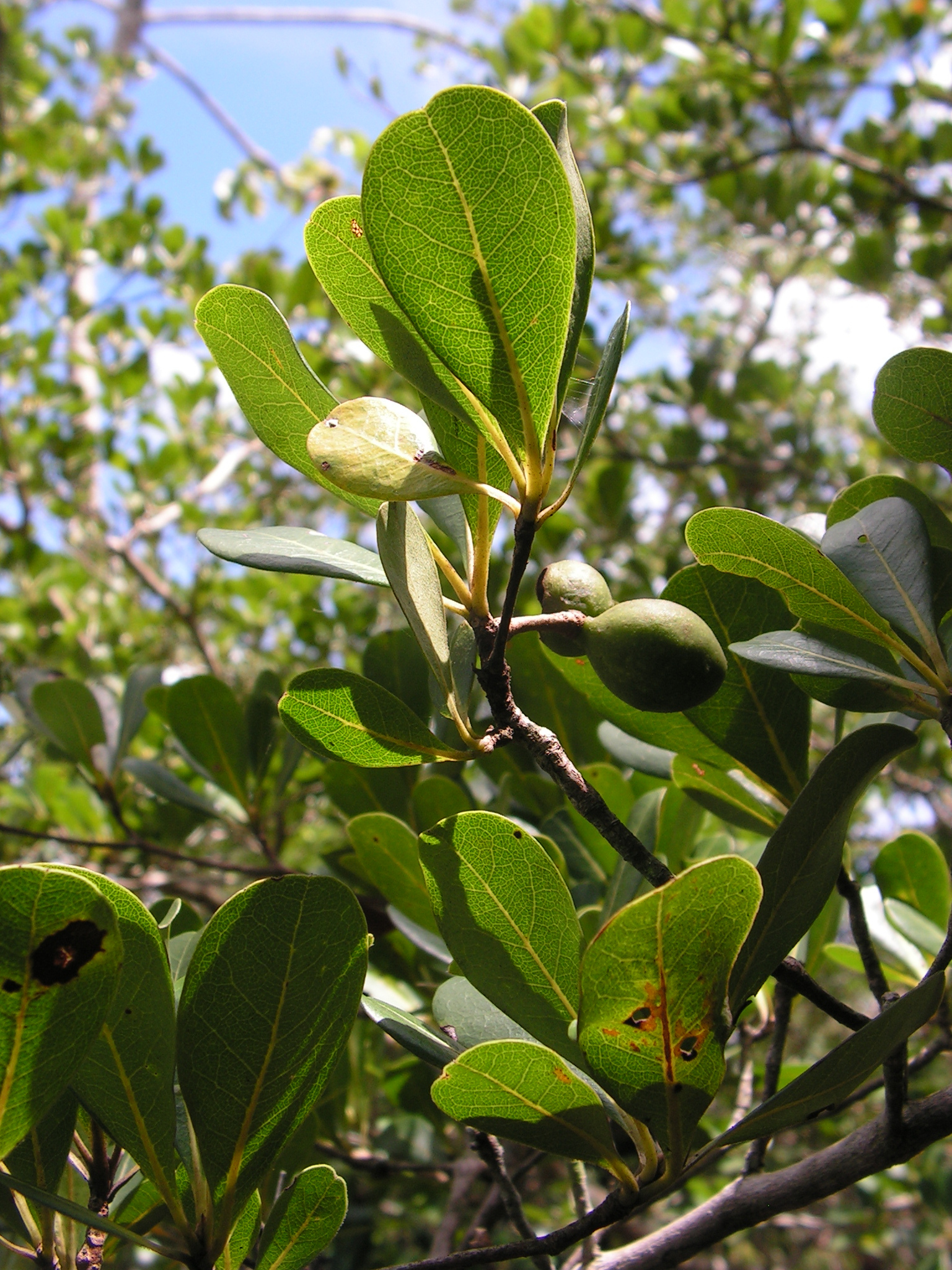 Combretaceae – Buchenavia tetraphylla (Aubl.) R.A.Howard – imbiridiba – árvore – Santa Rita, Paraíba, Brasil